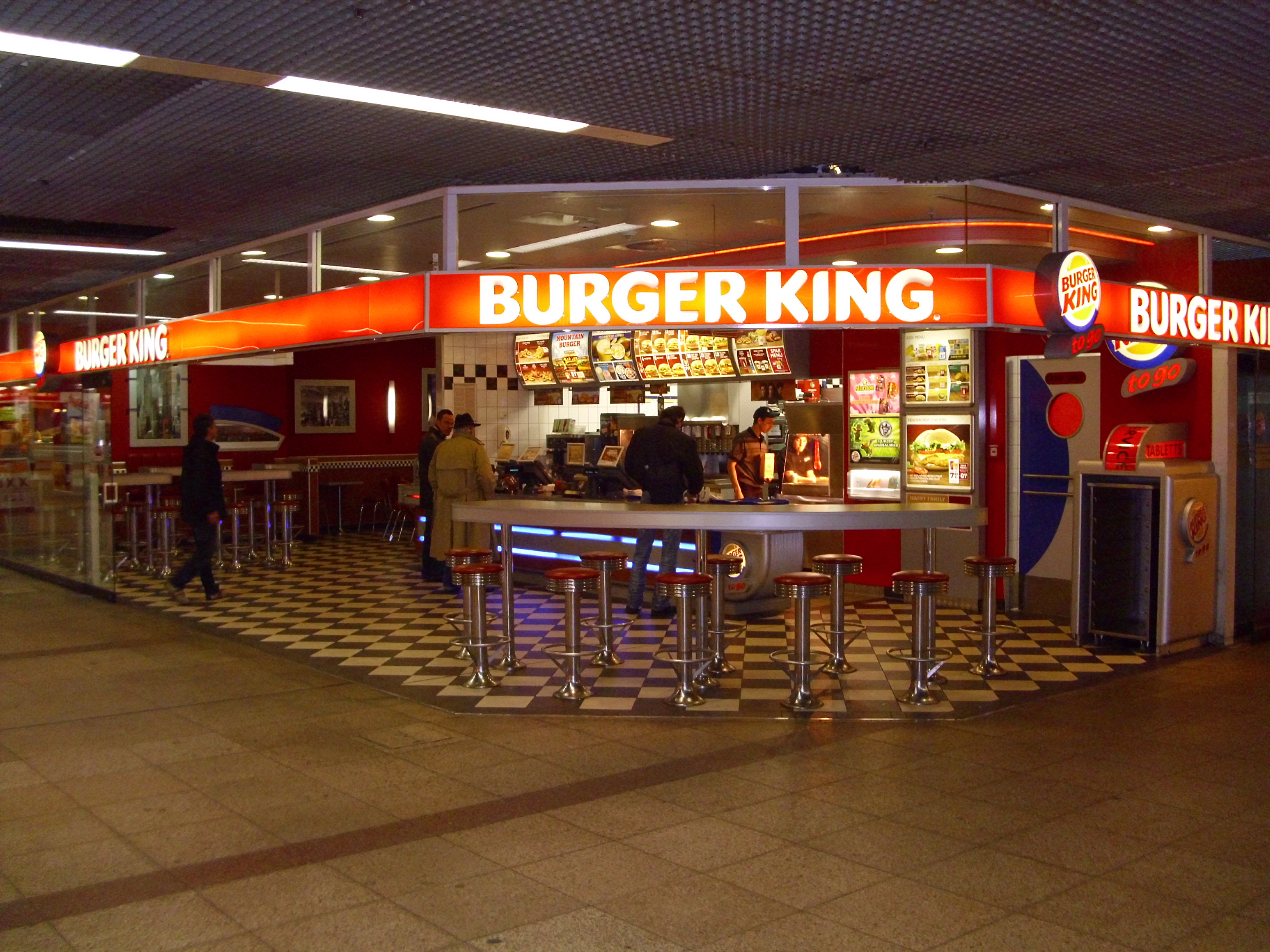 Der Frankfurter Hauptbahnhof im April 2010